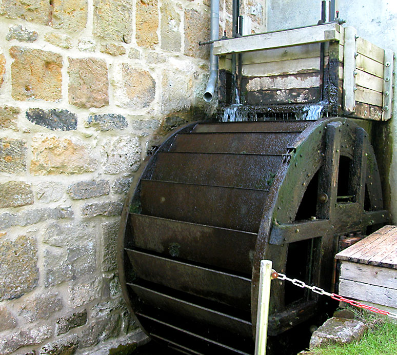 Mühlrad in Dorsten-Rhade